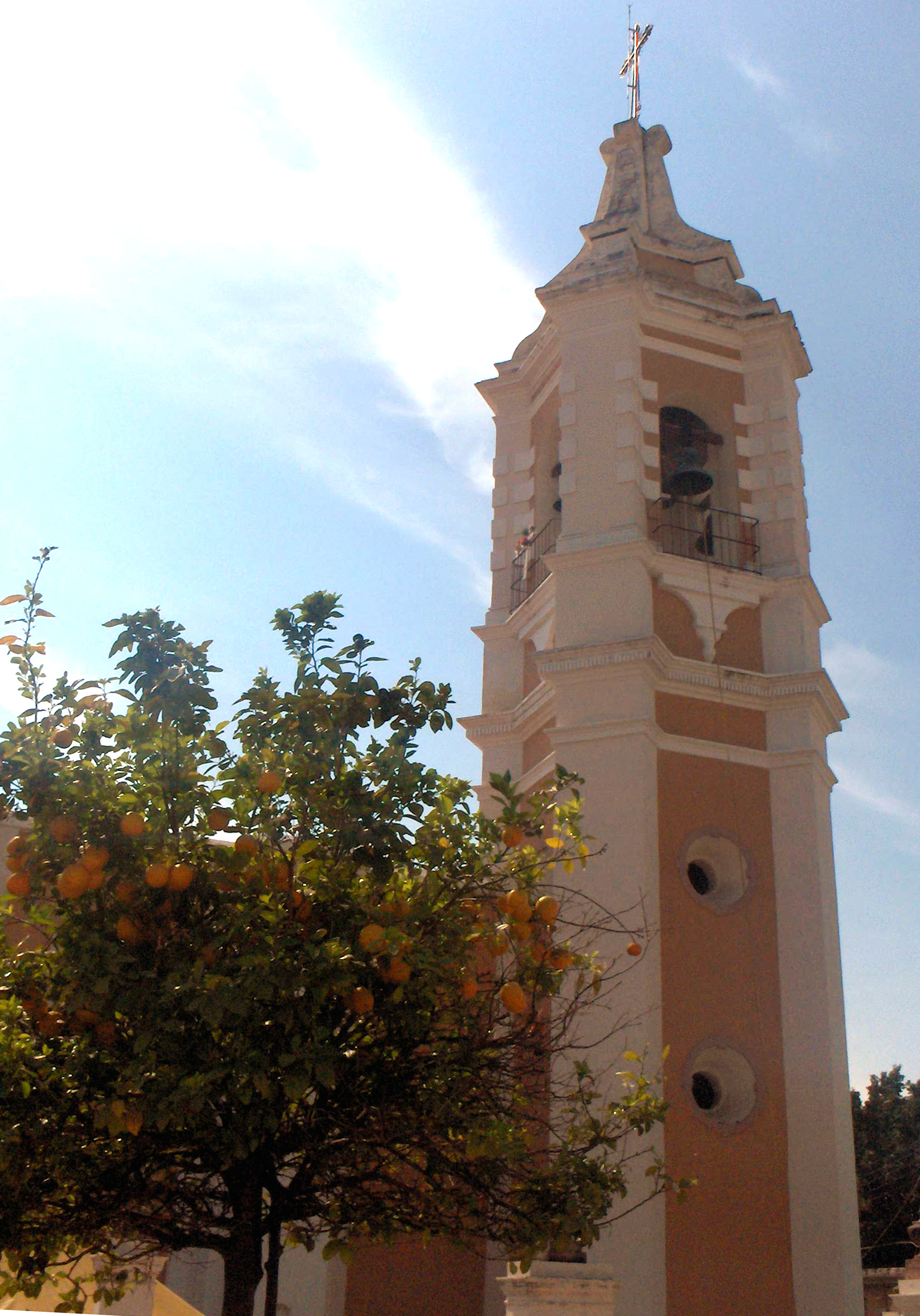 Beaterio Colima Mexiko